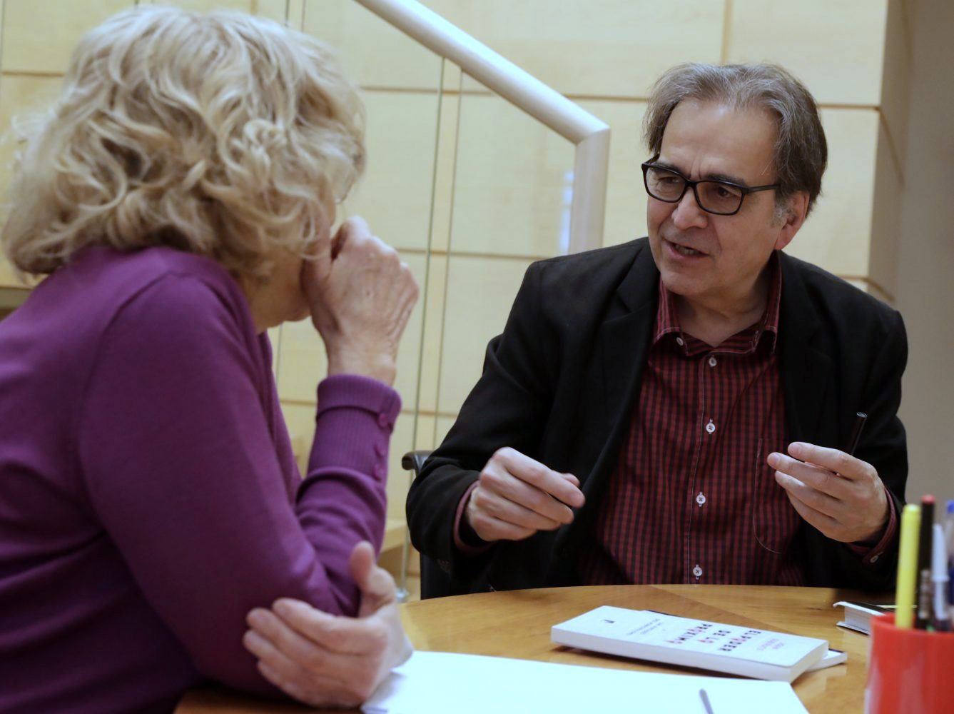 Joan Subirats, comisionado de Cultura del Ayuntamiento de Barcelona, se reúne con la alcaldesa Manuela Carmena y su equipo de Cultura. 2 de marzo de 2018